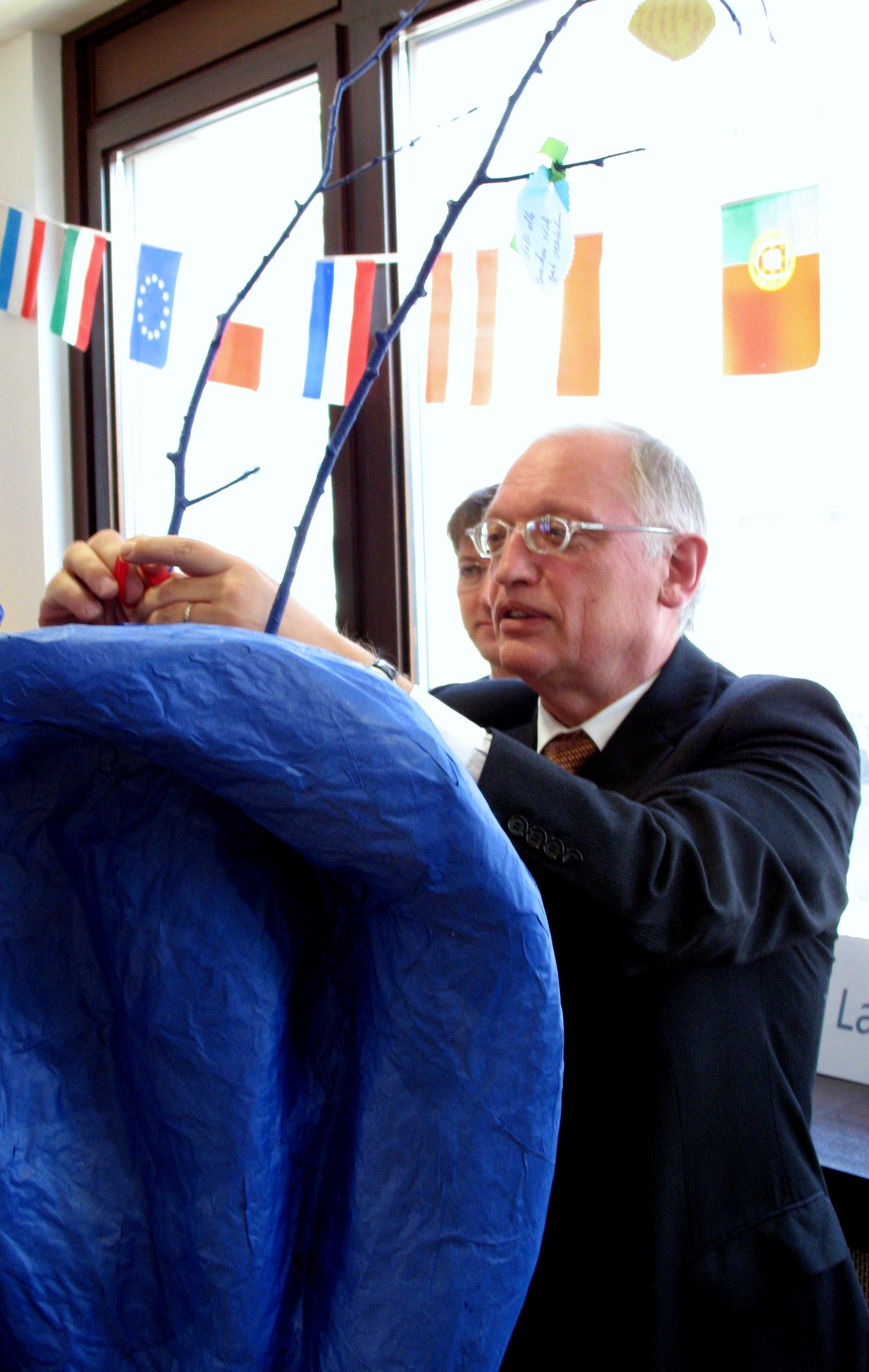 Günter Verheugen, 25.03.2007